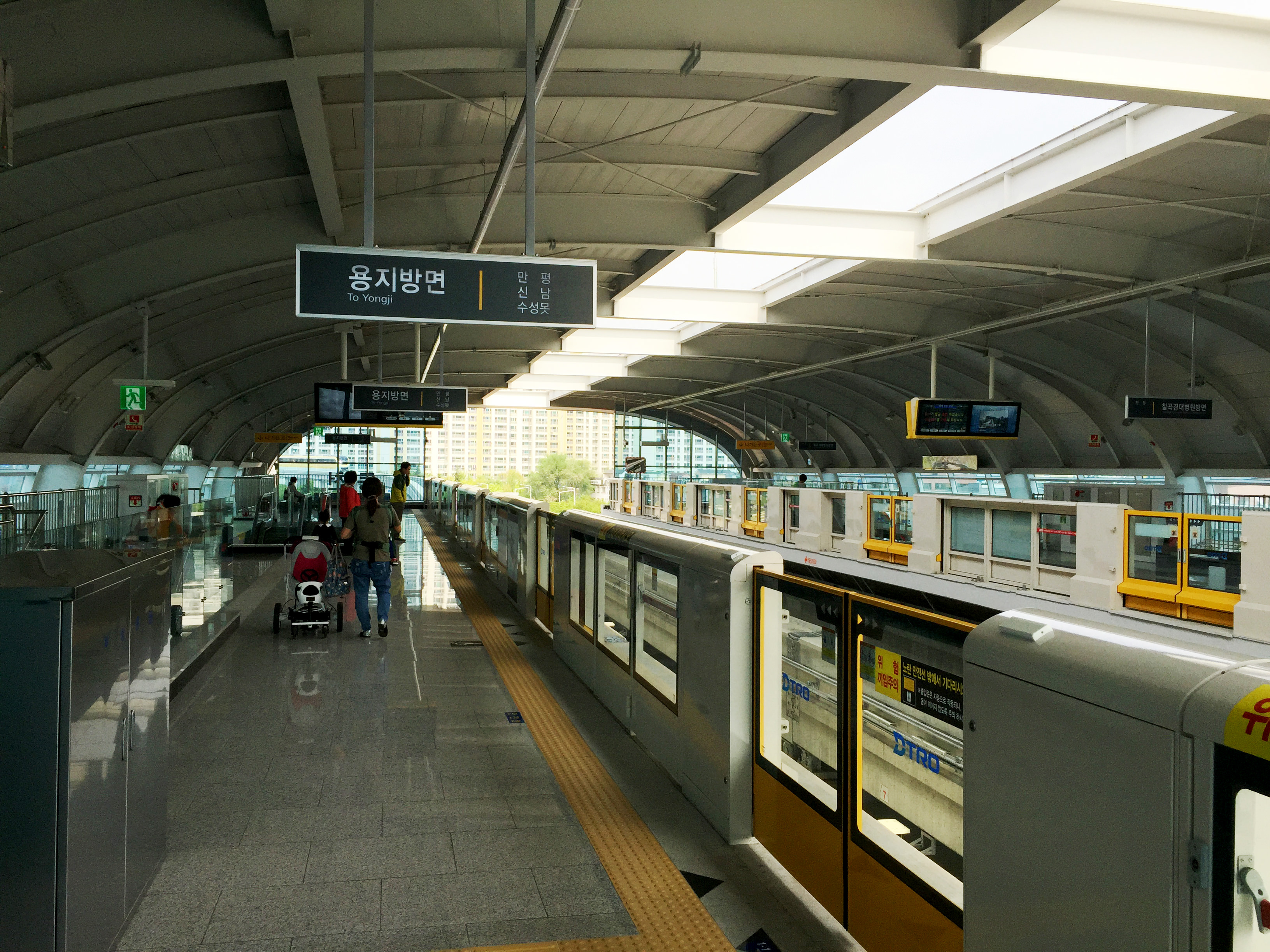 대구3호선 동천역 승강장